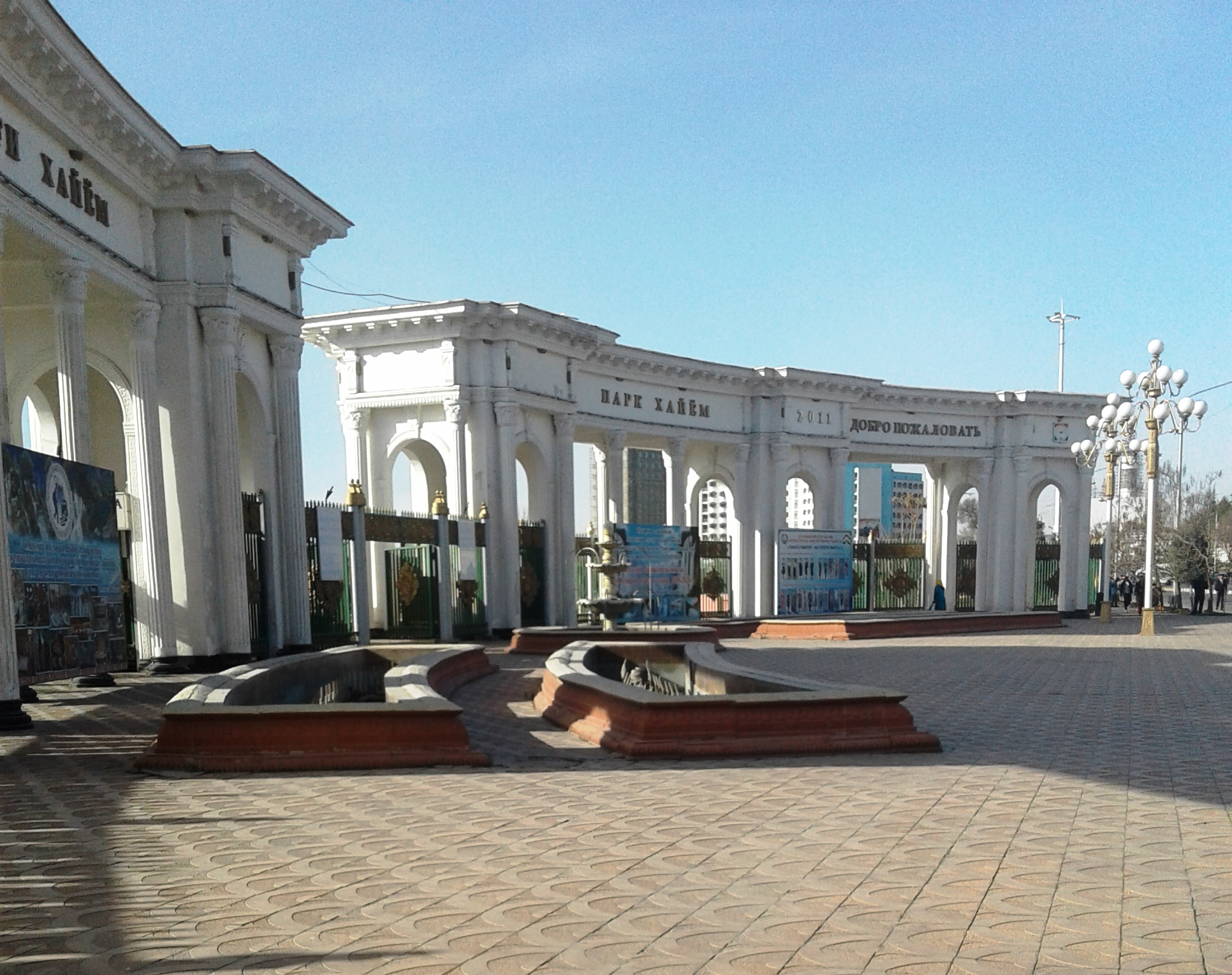 Парки в Душанбе